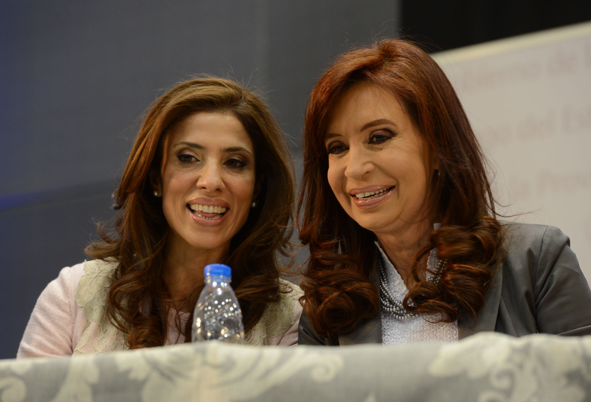 La presidenta Cristina Fernández encabeza el acto realizado en el Centro de Convenciones y Exposiciones Forum de Santiago del Estero. La acompaña la gobernadora de la provincia, Claudia Ledesma Abdala de Zamora.